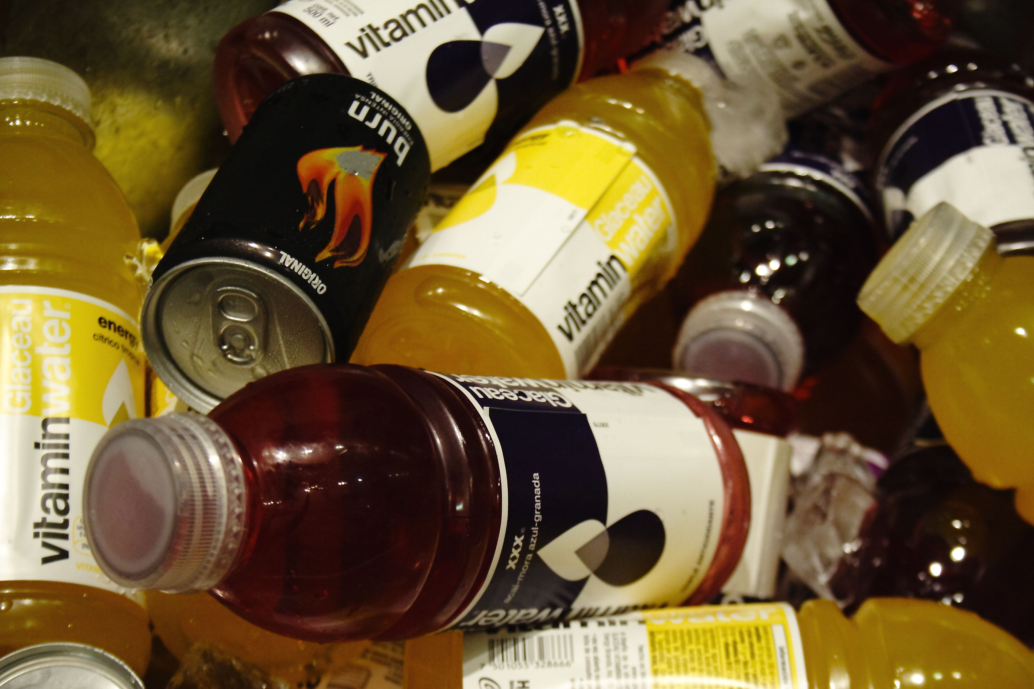 Vitamin Water y Burn, bebidas energizantes.